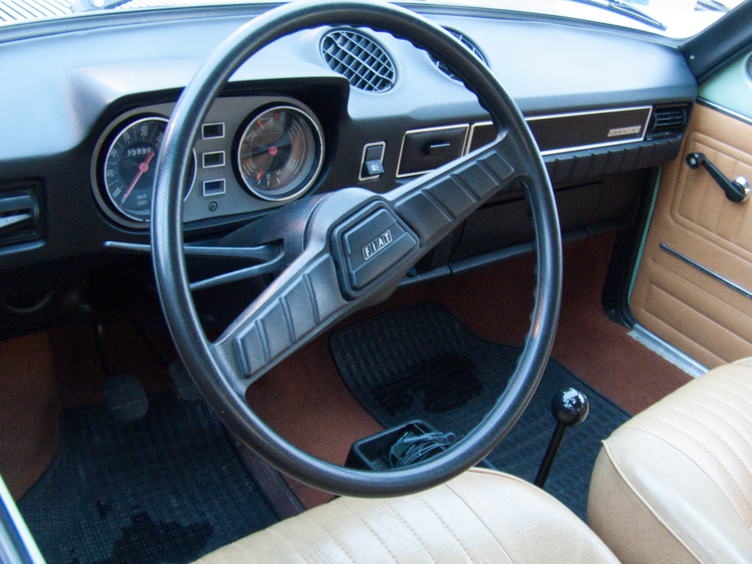 Fiat 128 Special